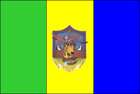 Bandeira de Anicuns, Goiás, Brasil.